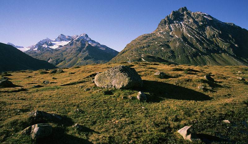 das Gebiet um den Silvrettastausee. So in etwa könnte der Ochsenboden ausgeschaut haben